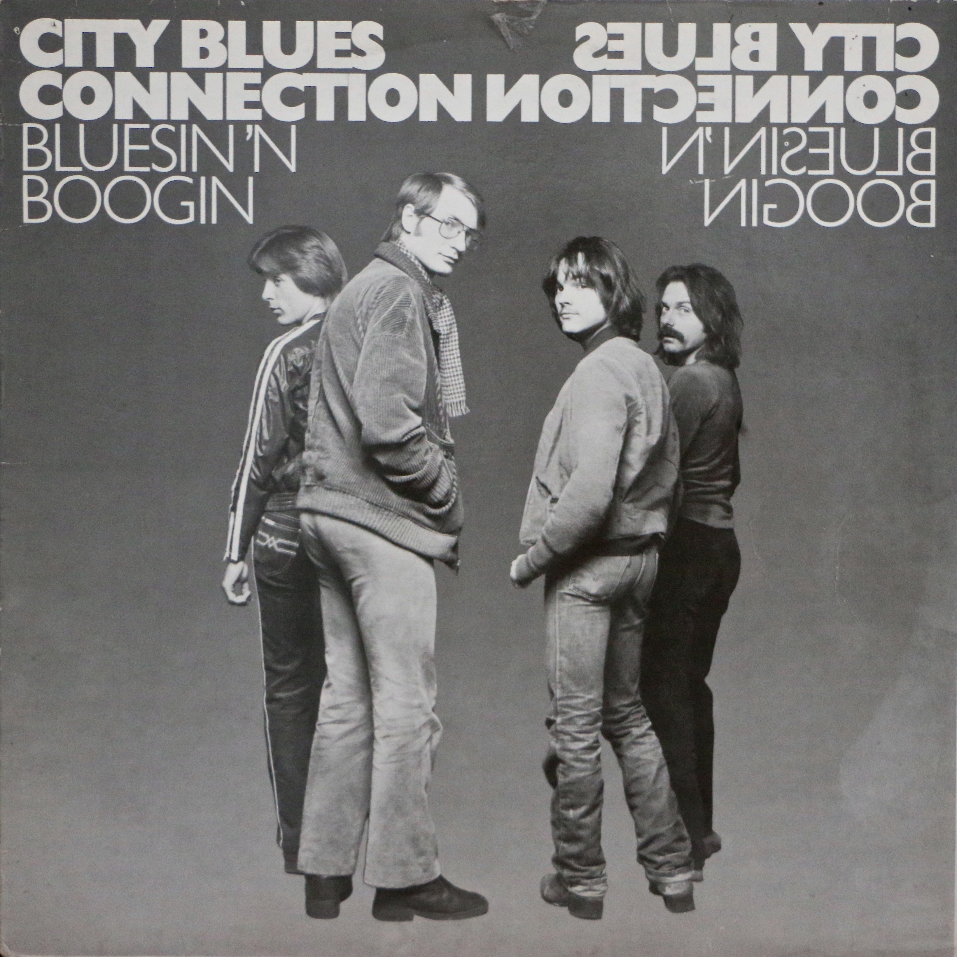 LP-Cover von 1980: City Blues Connection - Bluesin'n'Boogin'